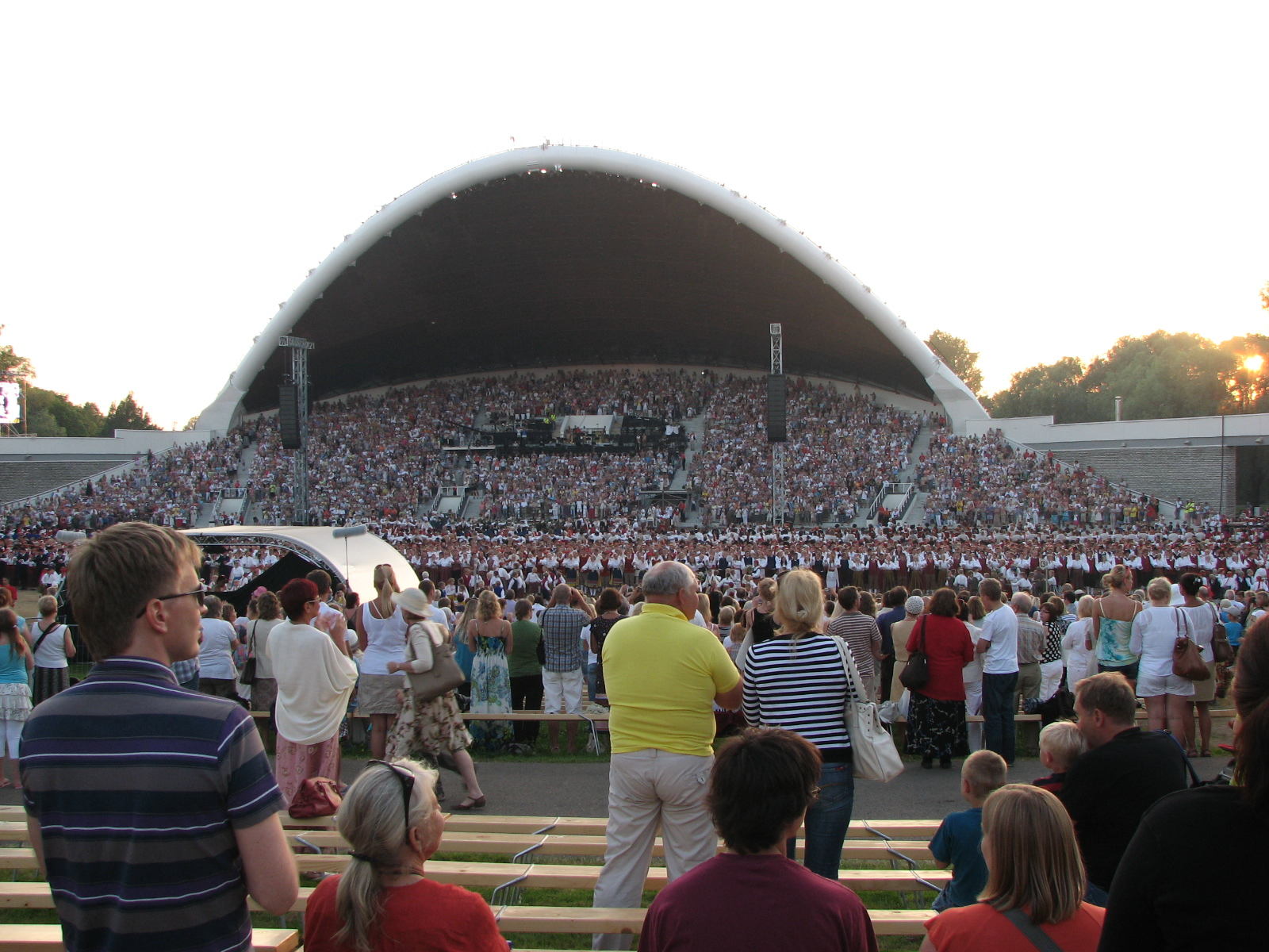 XI noorte laulu- ja tantsupeo teine õhtu